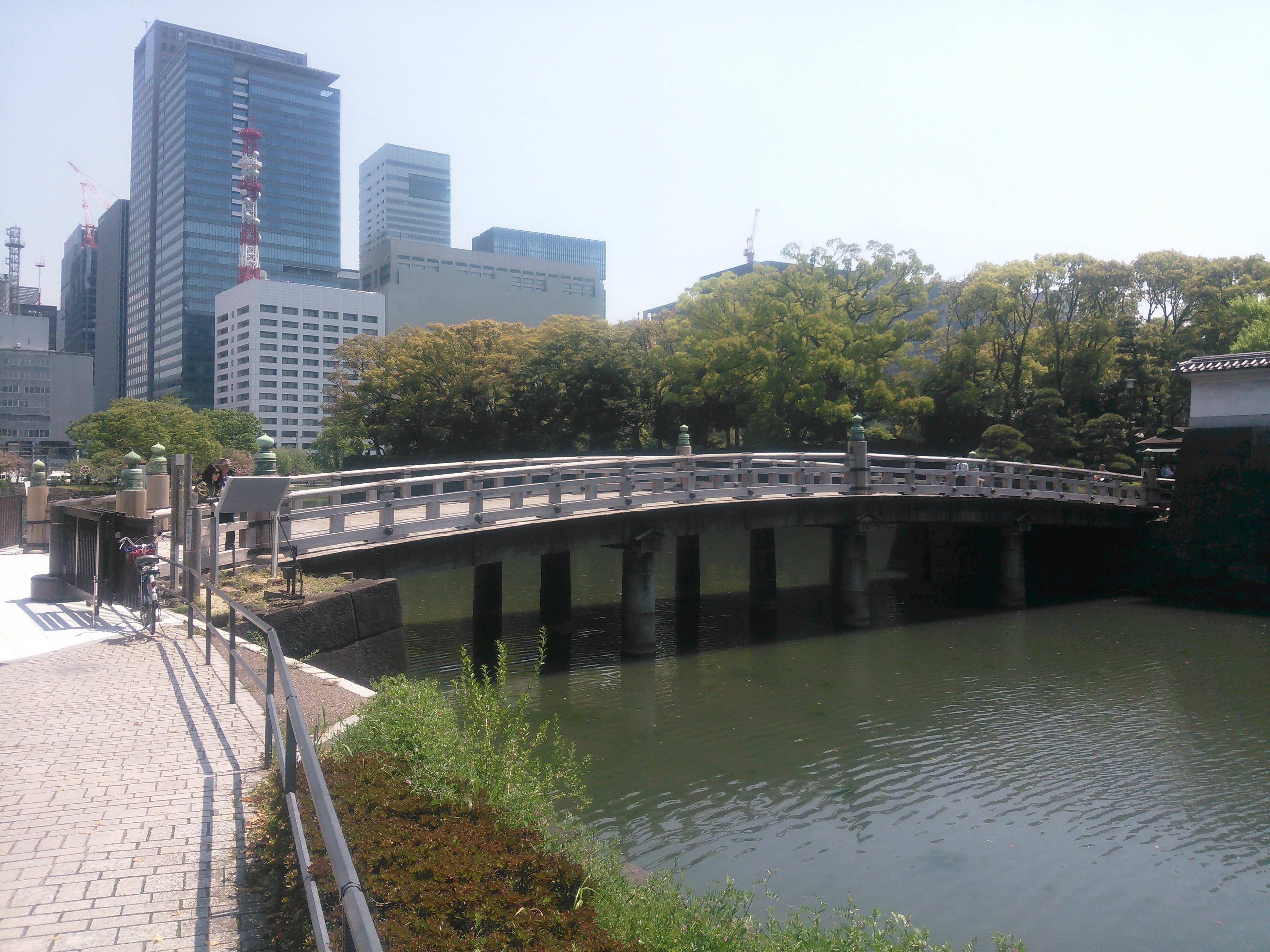 東京都千代田区、皇居内濠に架かる平川橋